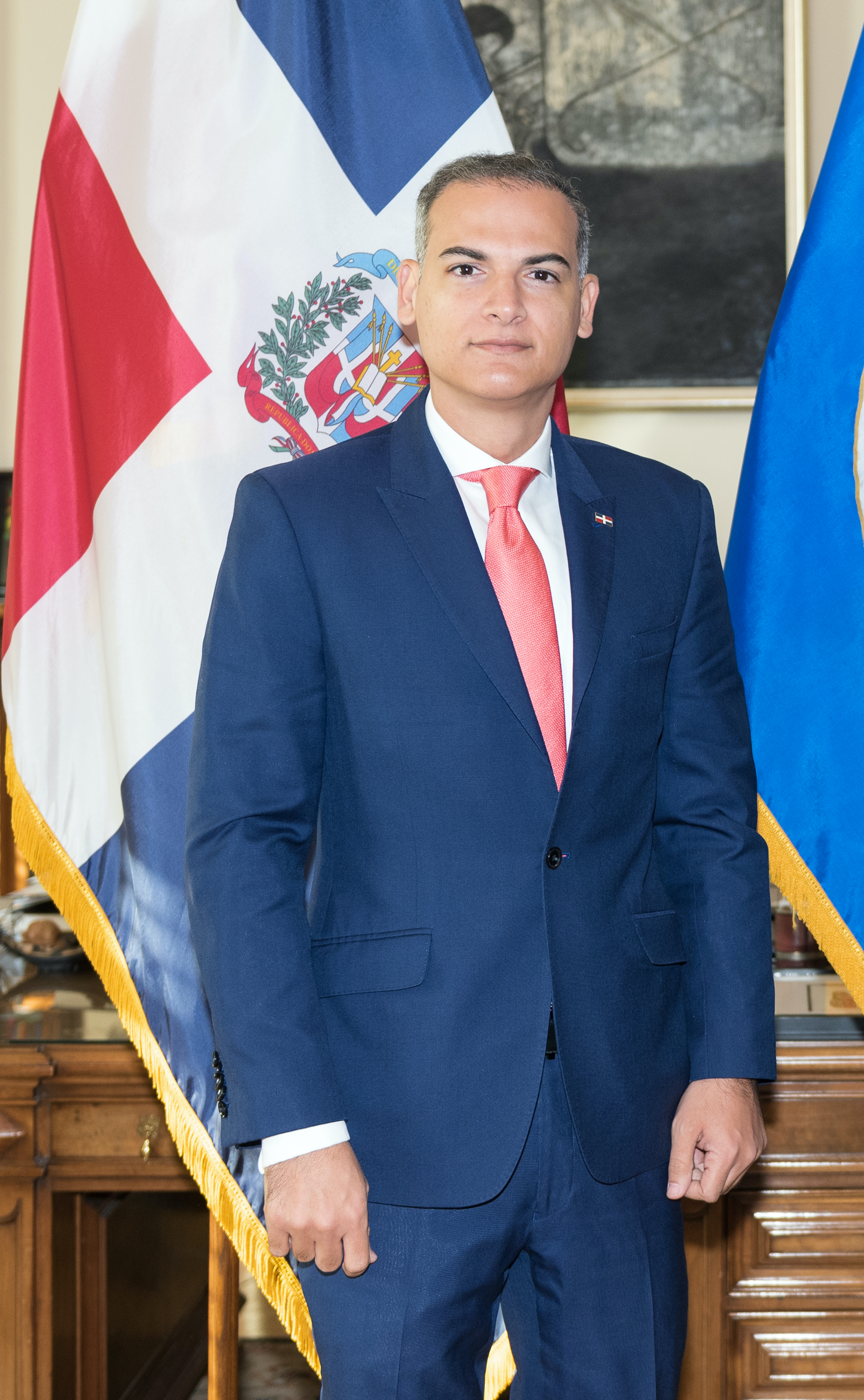 Representante Permanente de la República Dominicana